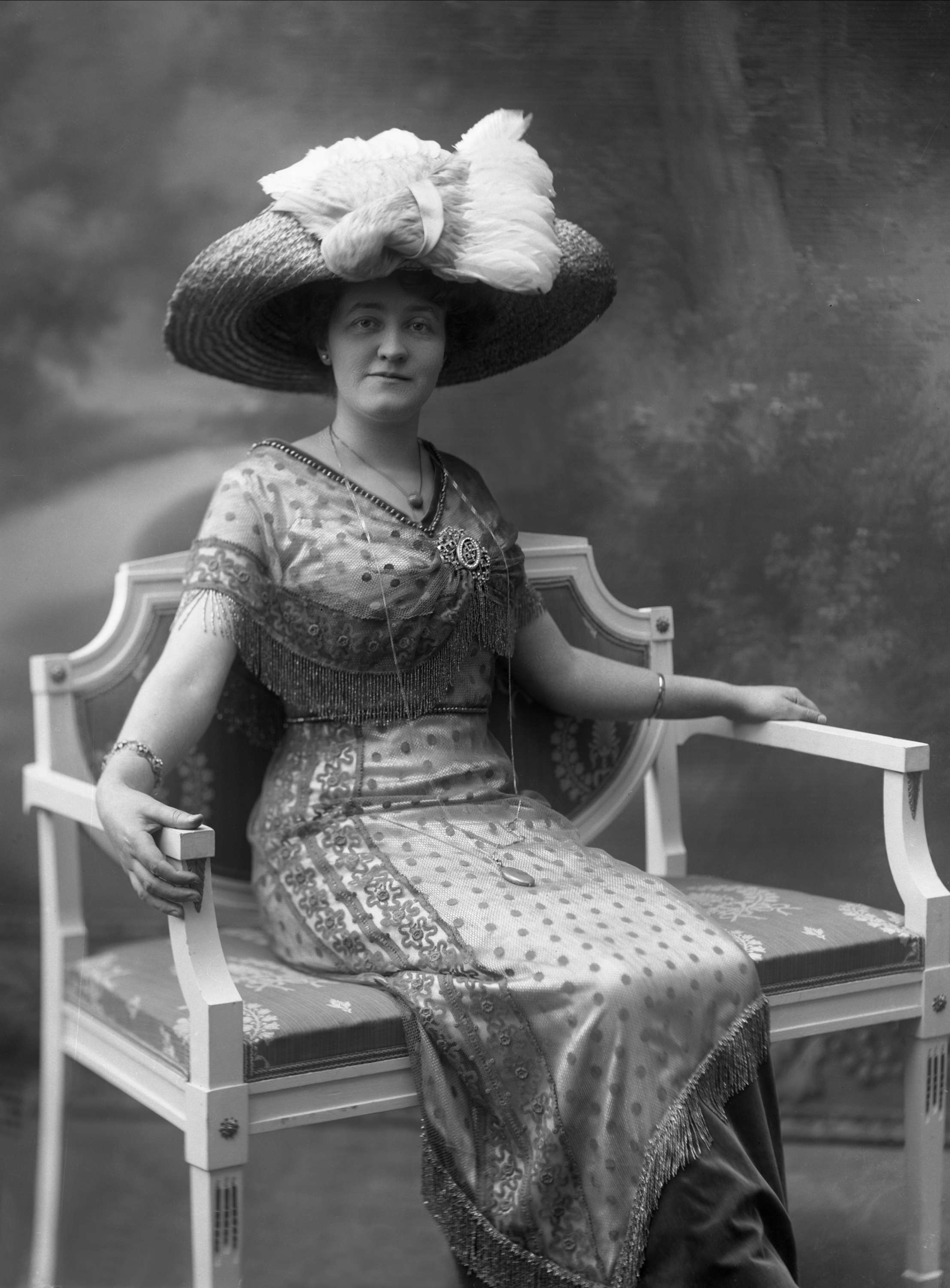 Skuespiller og sanger Gunhild Schytte-Jacobsen (1875-1945). Fotografert 15.09.1911 av Gustav Borgen.